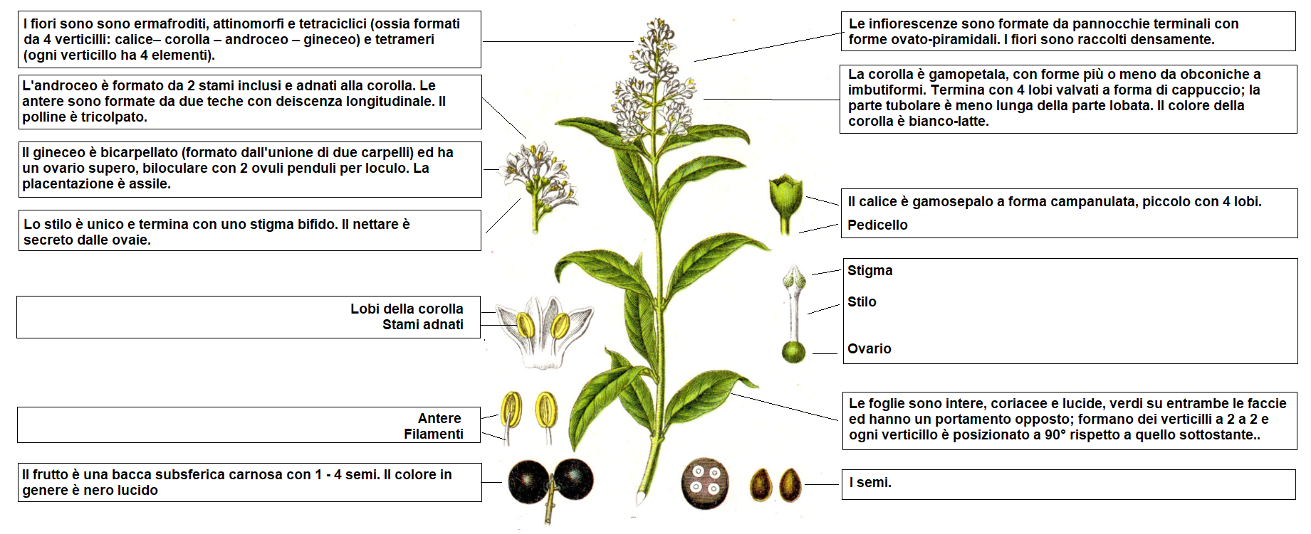 Ligustrum_vulgare - Descrizione delle parti della pianta